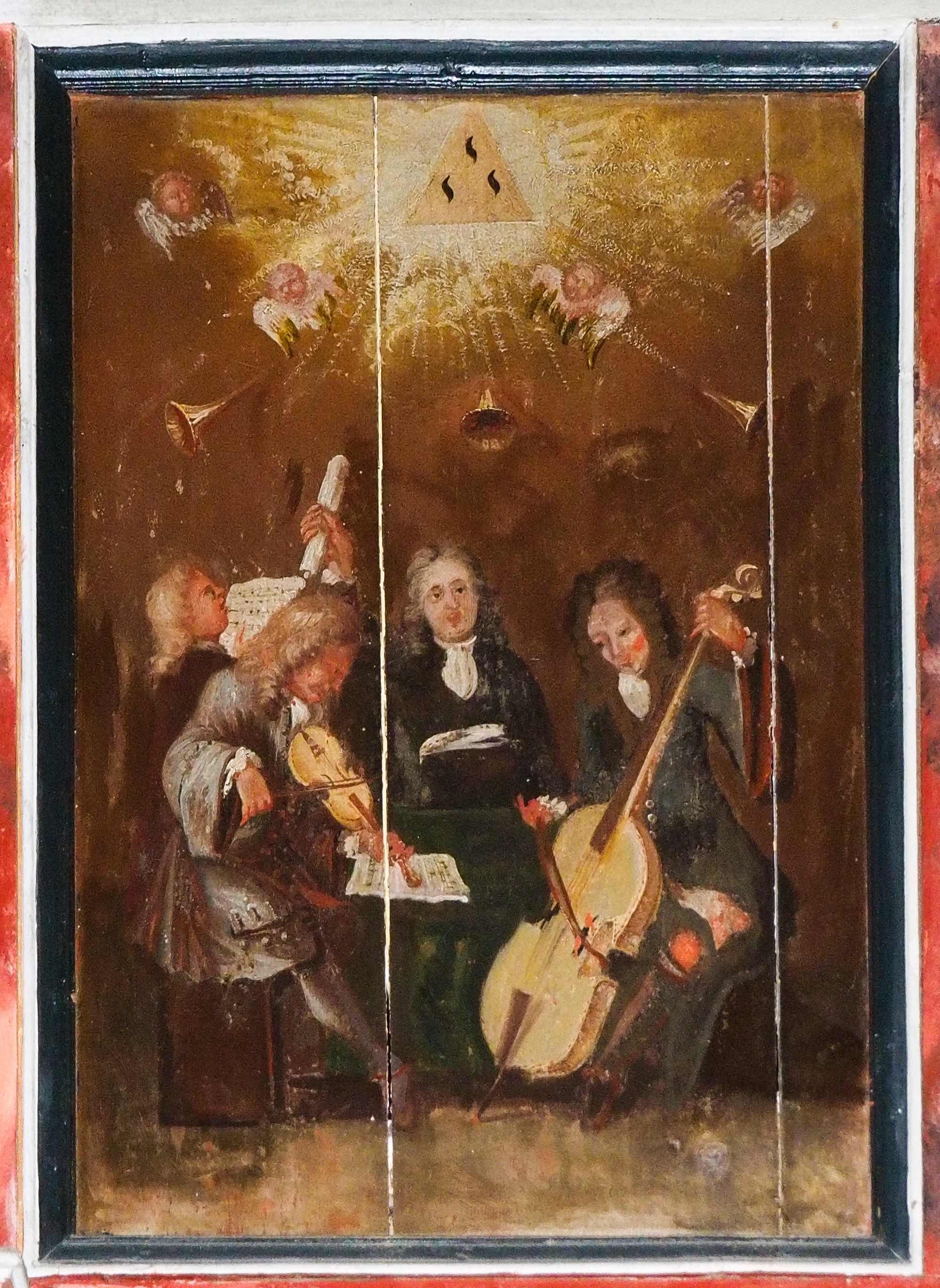 Gemälde in der St. Bartholomäuskirche (Golzwarden). Zeigt nach der Arp-Schnitger-Gesellschaft Golzwarden angeblich als zweiten von rechts den Orgelbauer Arp Schnitger. Er hält ein Dokument in die Höhe, bei dem es sich um das Orgelbau-Privilegium für die Grafschaft Oldenburg handeln soll.